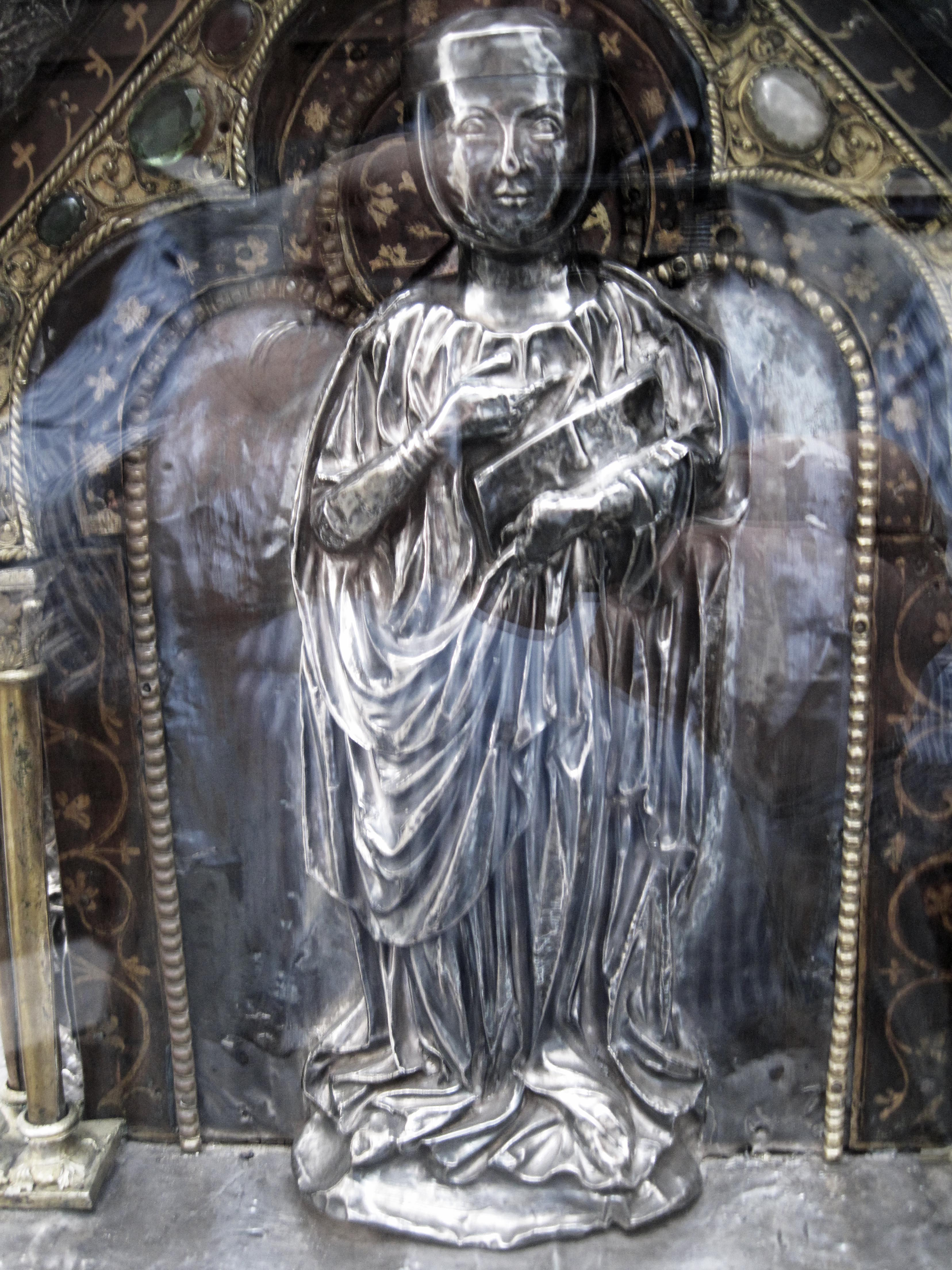 Saint-Ode représentée sur sa châsse à la Collégiale d'Amay.